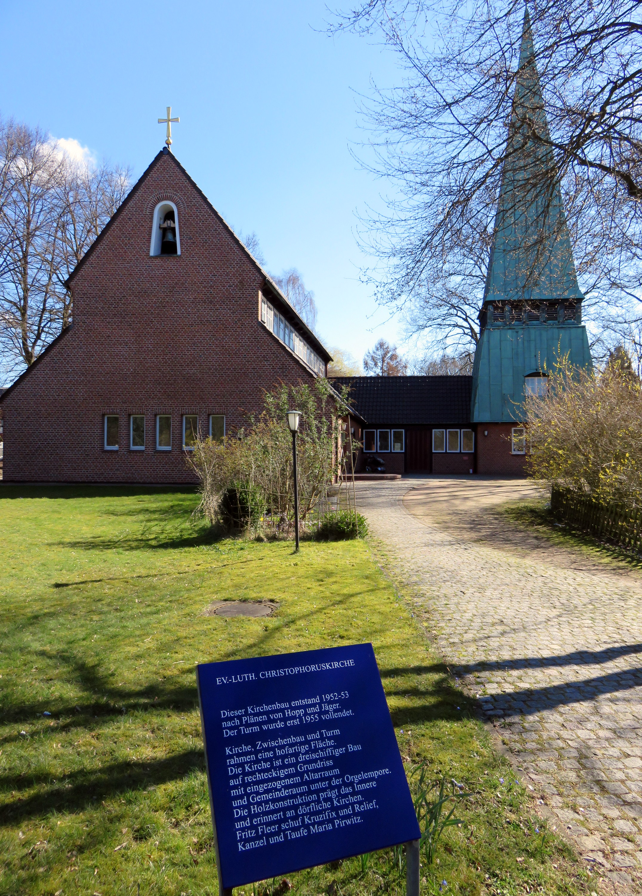 Christophorus-Kirche Poppenbüttler Stieg 25 in Hamburg-Hummelsbüttel This is a photograph of an architectural monument.